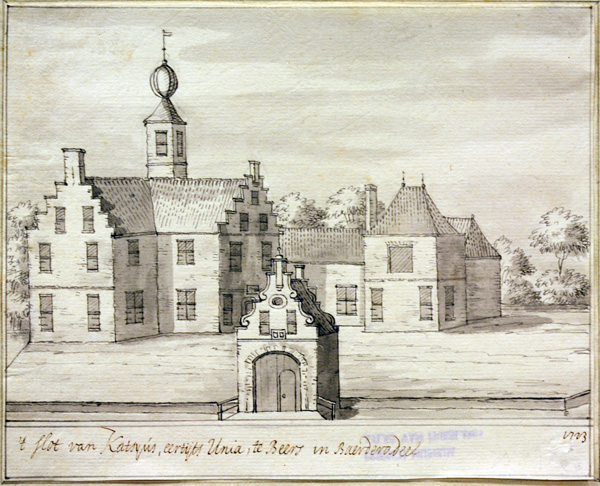 De Uniastate te Bears getekend door Jacobus Stellingwerf in 1723.